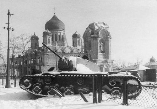 Ростов-на-Дону в оккупации, 1943